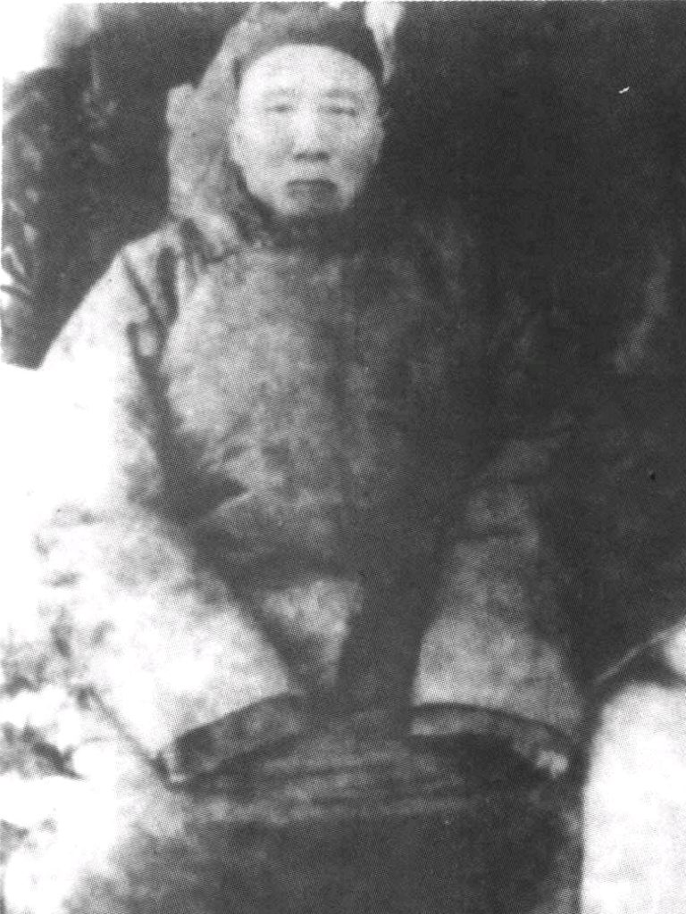 王先谦的照片，其人于1917年去世